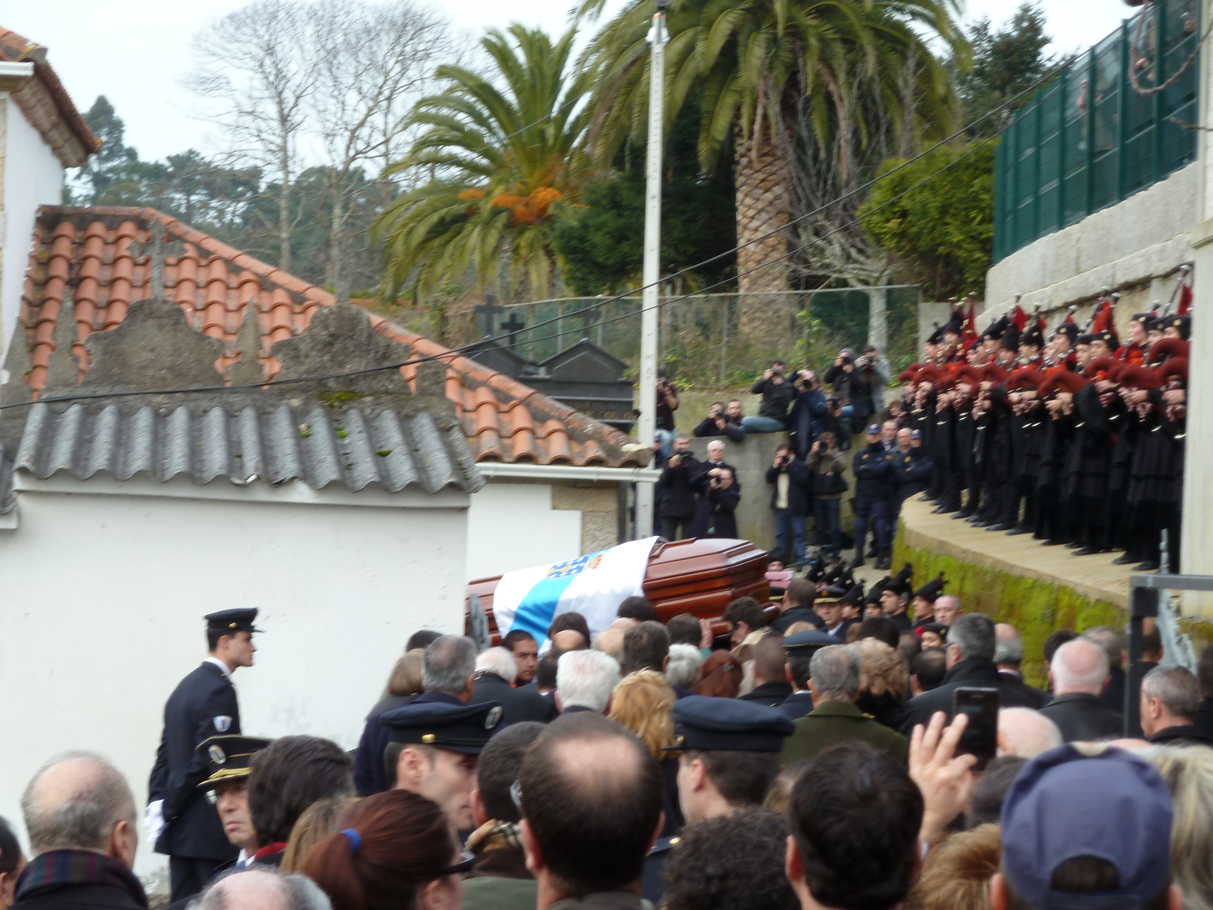 Enterro Fraga Perbes